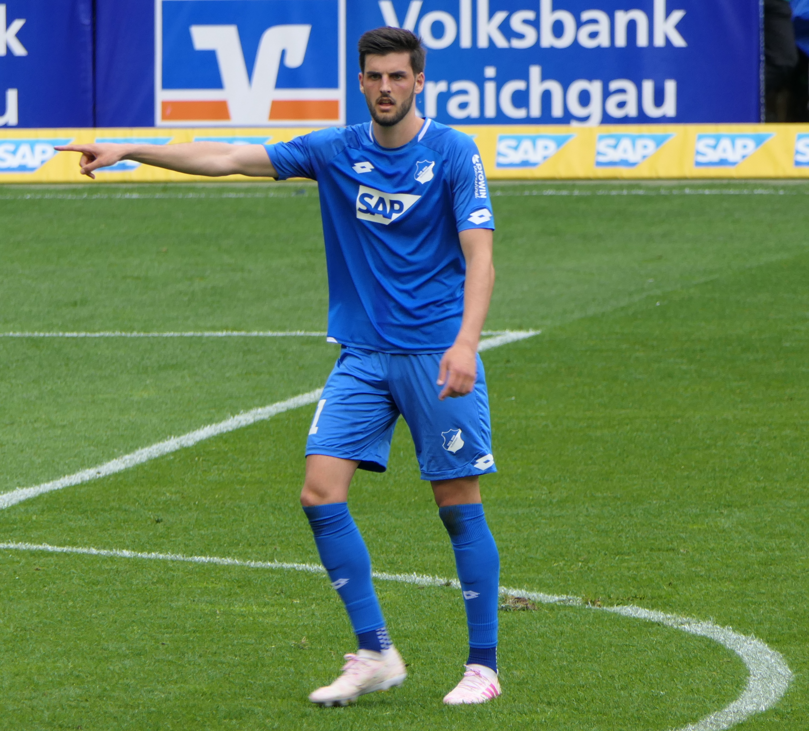 Der Fussballprofi Florian Grillitsch im Trikot der TSG 1899 Hoffenheim beim Heimspiel gegen den SV Werder Bremen am 11.05.2019.